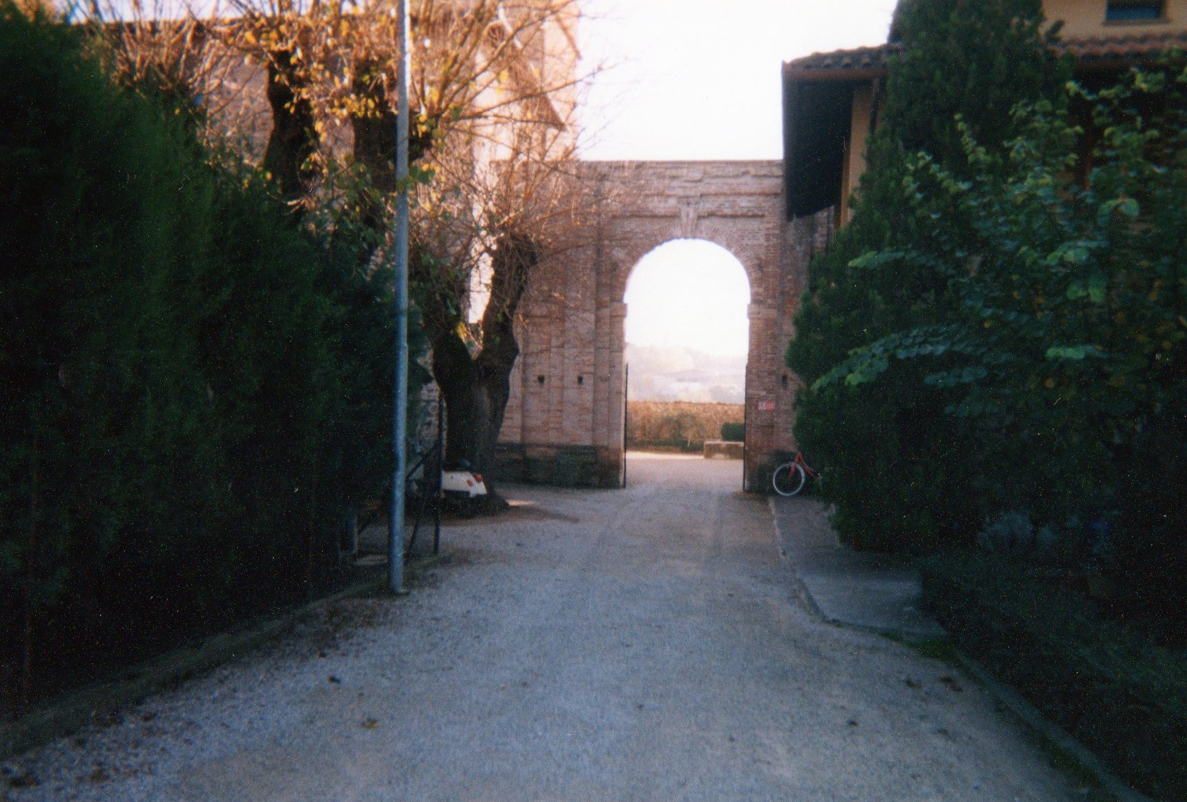 portale d'accesso all'abbazia dei Sette Frati, a Pietrafitta (Perugia)